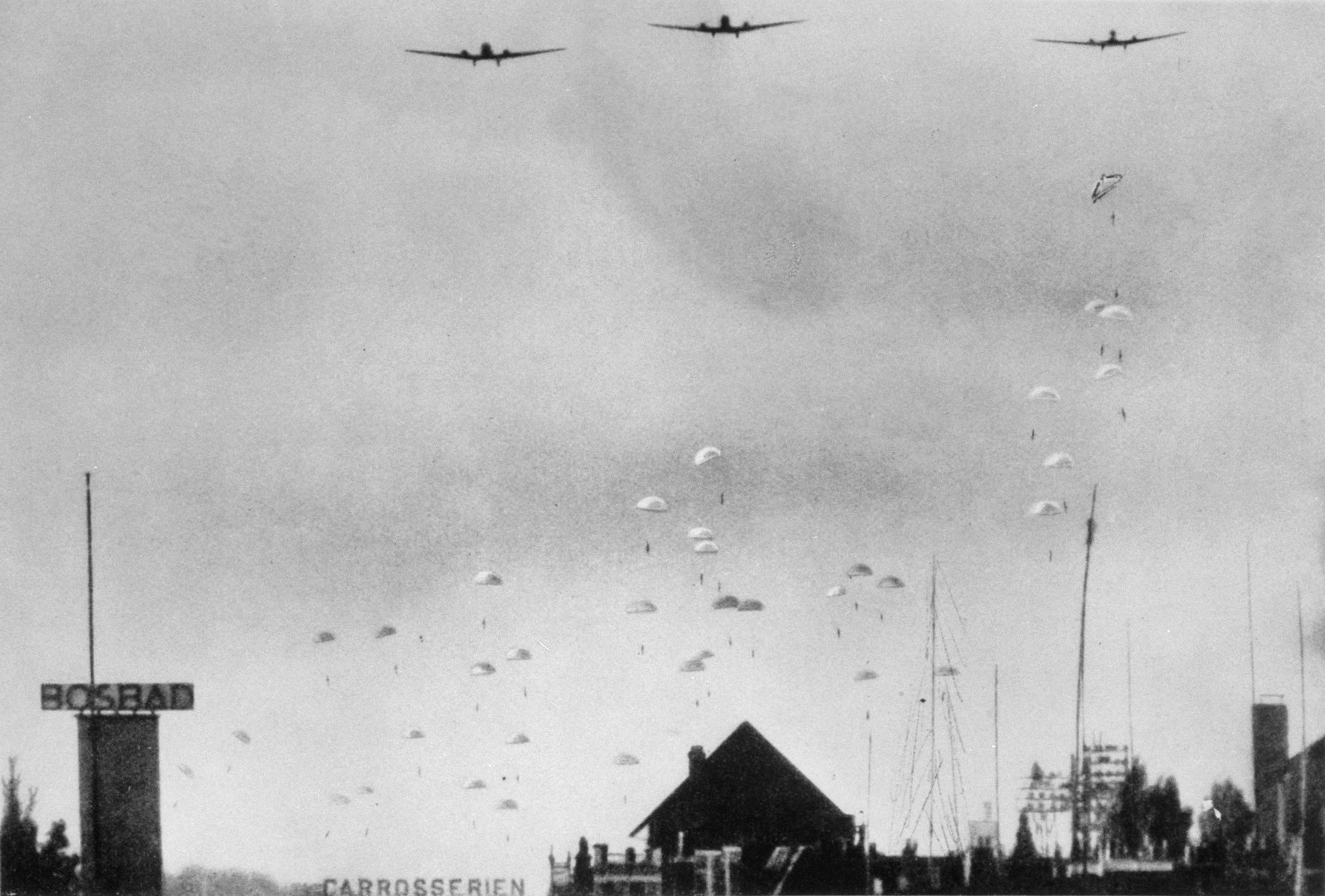 Landing van Duitse parachutisten in de Tedingerbroek-polder, Oost van ‘s-Gravenhage. Foto rond 4 uur 's ochtends. De foto is genomen vanuit de woning van H. Lamme (voorzitter van de Nederlandse Bond van Foto Journalisten), op de 2e verdieping, aan de Helenastraat 2 te Den Haag, richting Ypenburg. Op de zijn drie Junkers Ju-52 transportvliegtuigen zichtbaar, parachutisten en het voormalige bosbad aan de Amalia van Solmstraat 38 in Den Haag. Er is door de sectie G 8 van de Legerhistorie in 1948 onderzoek gedaan naar de echtheid van de foto. Door het niet geheel uit ontwikkelen van de foto zijn scherpe omlijningen om de parachutes gekomen, waardoor het lijkt of deze werden bijgetekend. De foto bleek echt te zijn, niet samengesteld en niet bijgetekend. De foto is kort na de meidagen van 1940 uitgegeven als herinneringsfoto. Twee van deze vliegtuigen werden getroffen. Nummer één stortte neer in de Tweede Adelheidstraat. Nummer twee maakte een crash in het Haagse Bos. Op het V.U.C. terrein was de 164e Bt. Lua gelegen. Deze eenheid was verantwoordelijk was voor het neerschieten van twee van de drie Ju-52’s. [1]